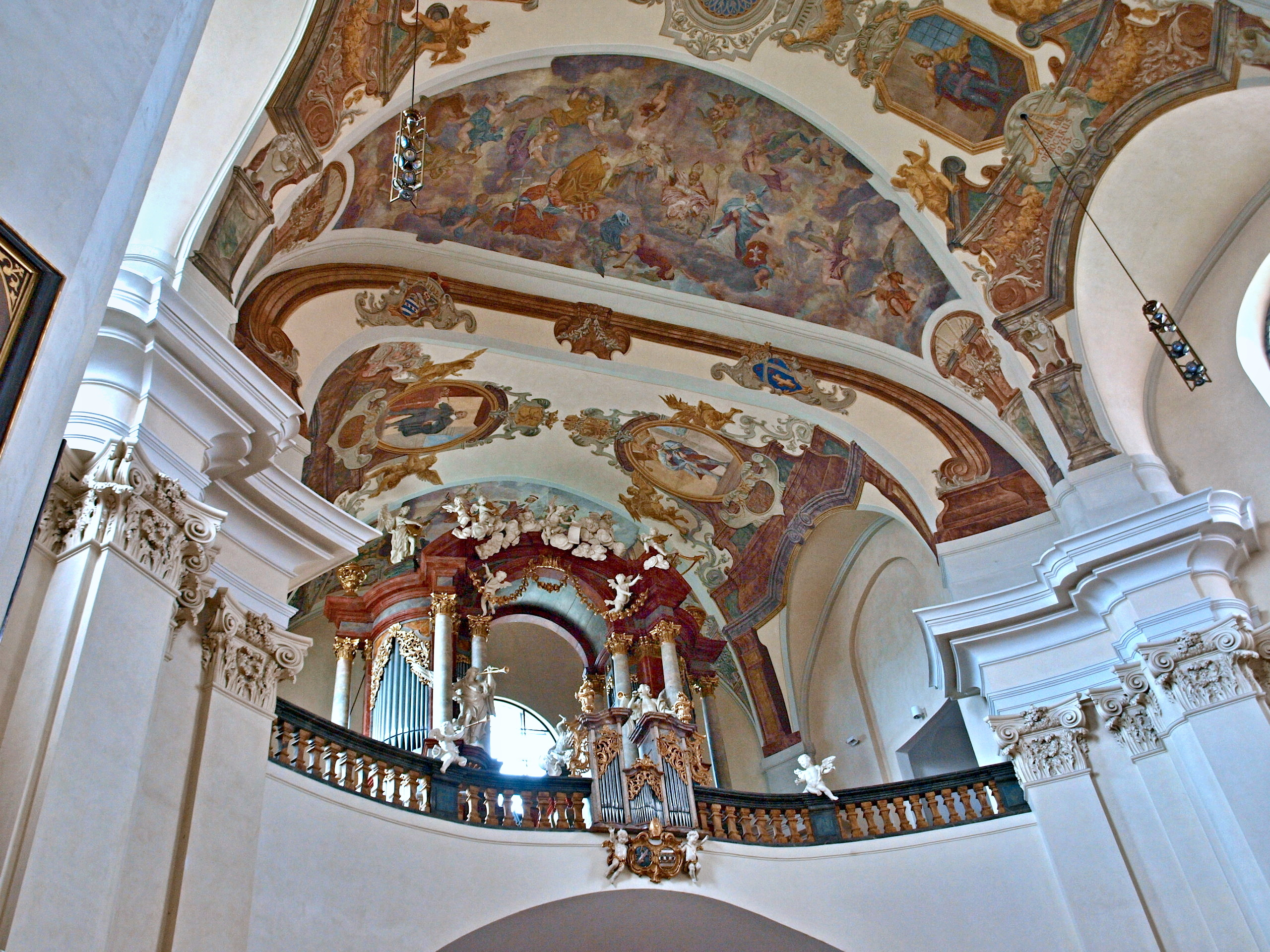 Břevnovská klášterní bazilika sv. Markéty